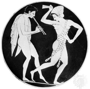 Авлет и кроталистка. Изображение на античном килике (V в. до н.э.)